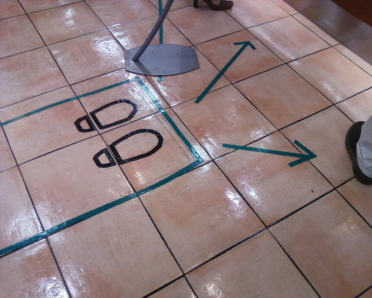 フォーク並び